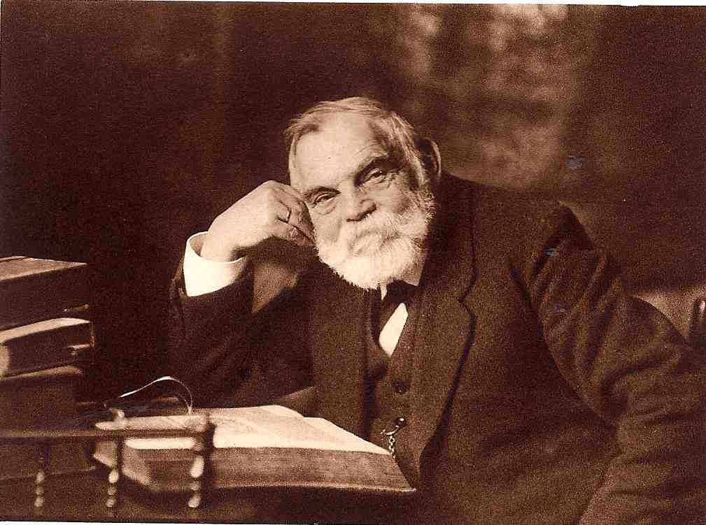 Clemens Cassel Portrait